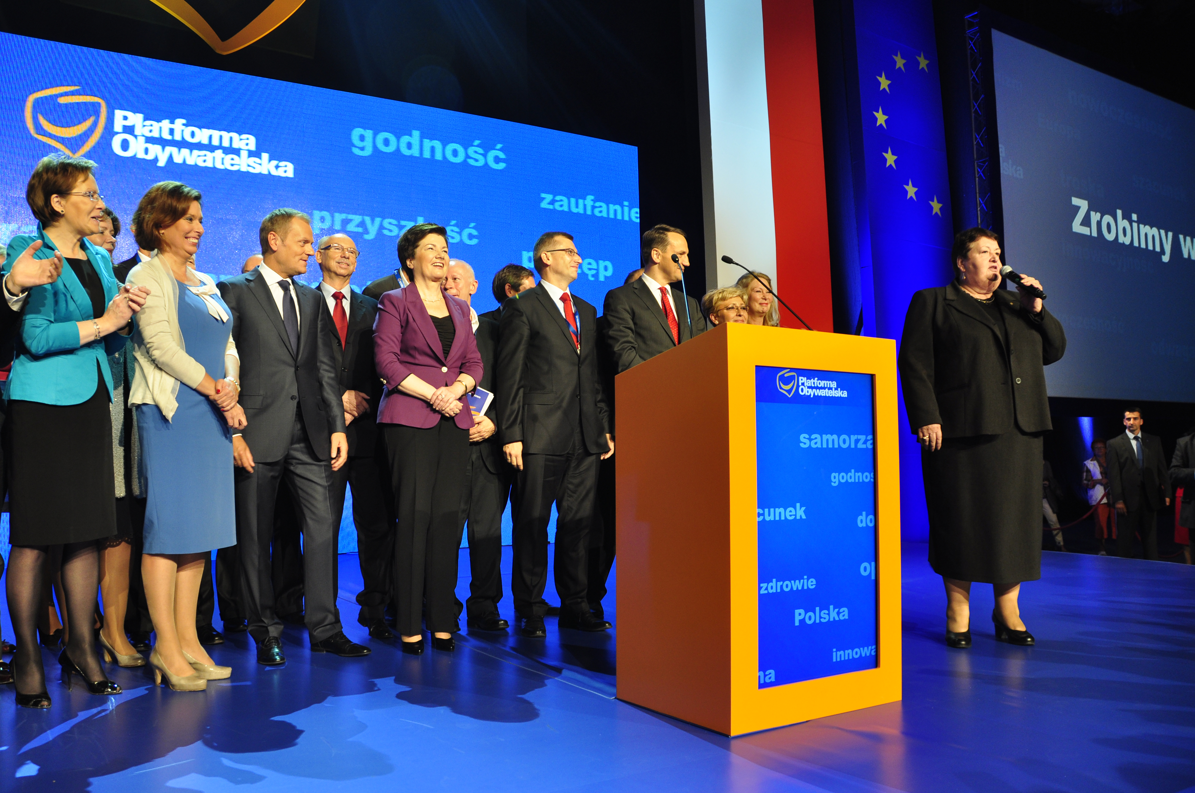 Konwencja Programowa Platformy Obywatelskiej RP, 10.09.2011 Warszawa